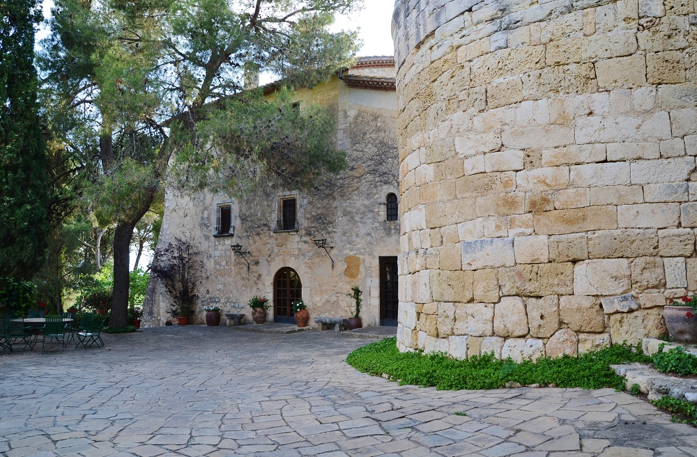 Torre de les Gunyoles (Avinyonet del Penedès)